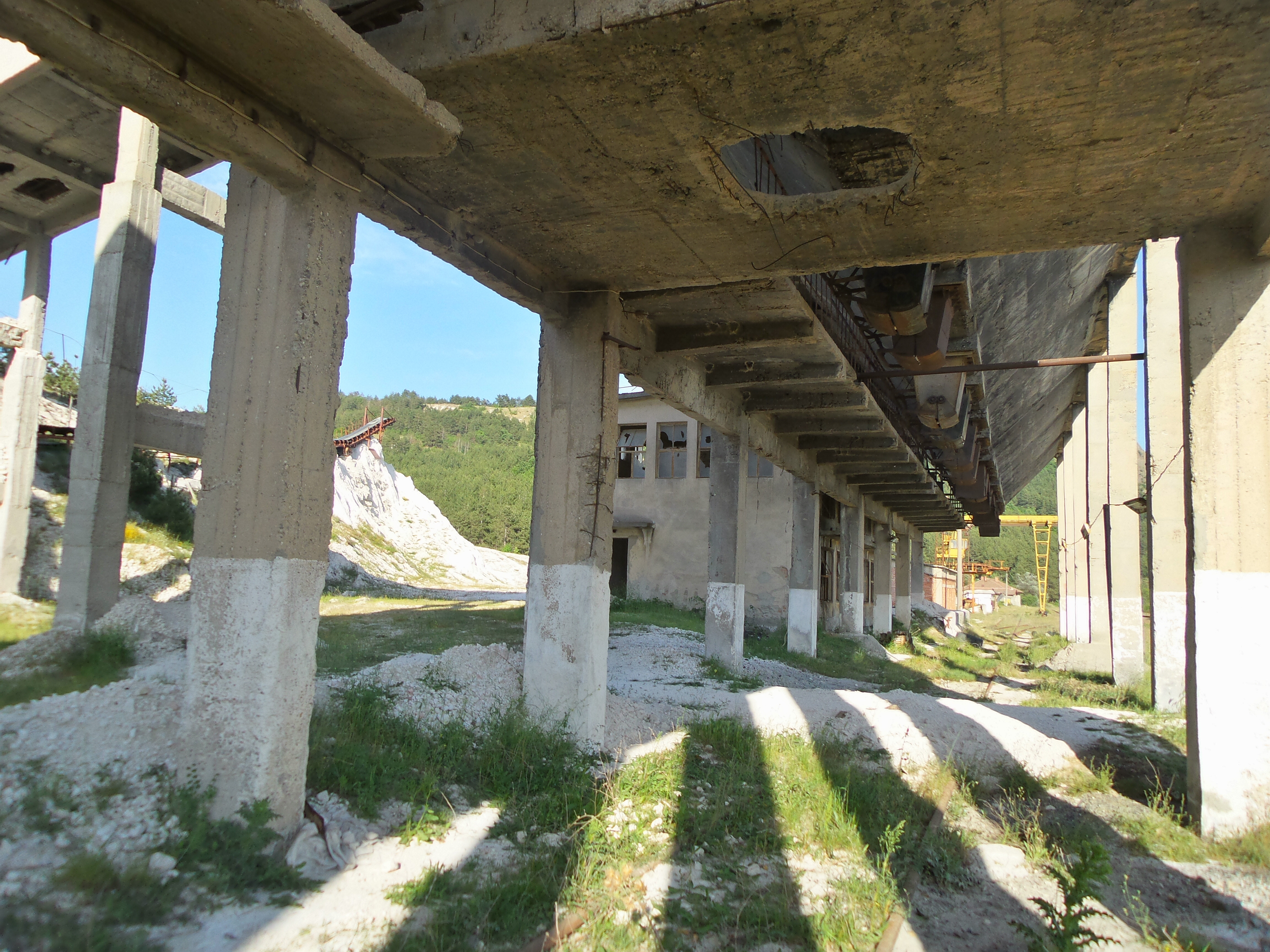 Изоставено индустриално съоръжение при спирка "Желязна врата" и маневрена линия за товарни вагони. При тази спирка е функционирало и релсово разтоварище на съществувалата кариера за добив на инертни материали.